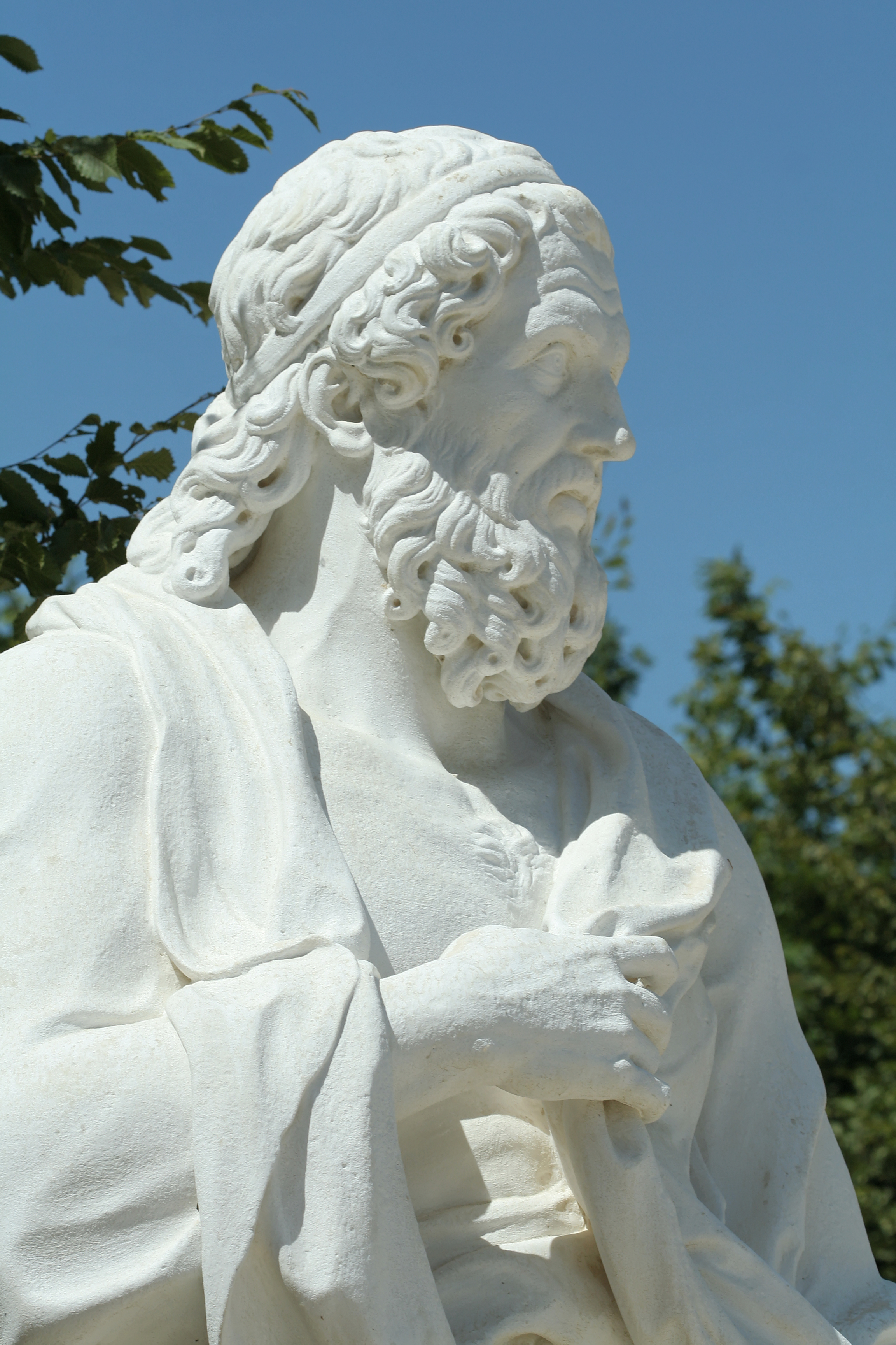 Parc de Versailles, Rond-Point des Philosophes. Isocrate, Pierre Granier (1684-1688) MR1870